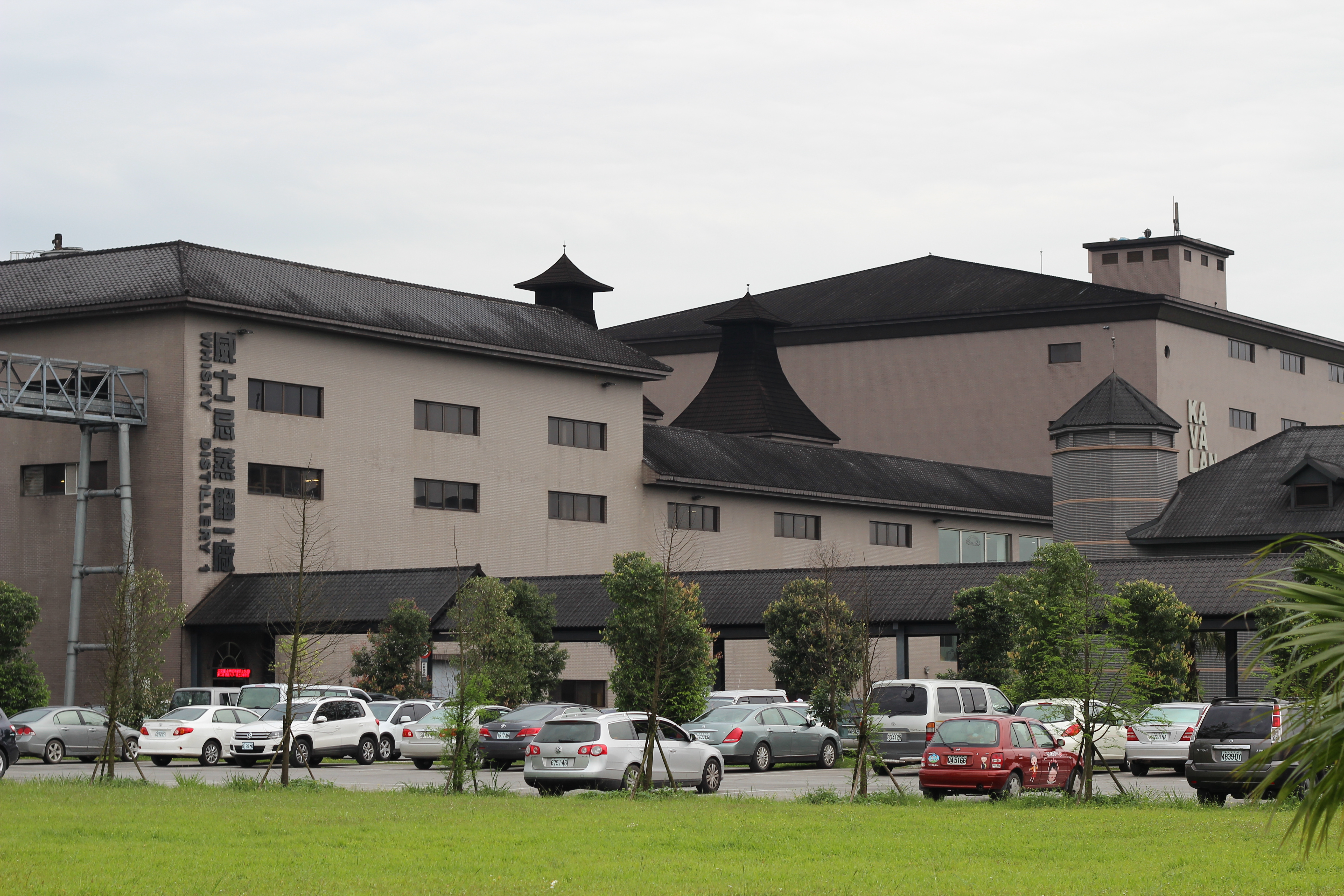 金車噶瑪蘭威士忌酒廠威士忌蒸餾一廠。